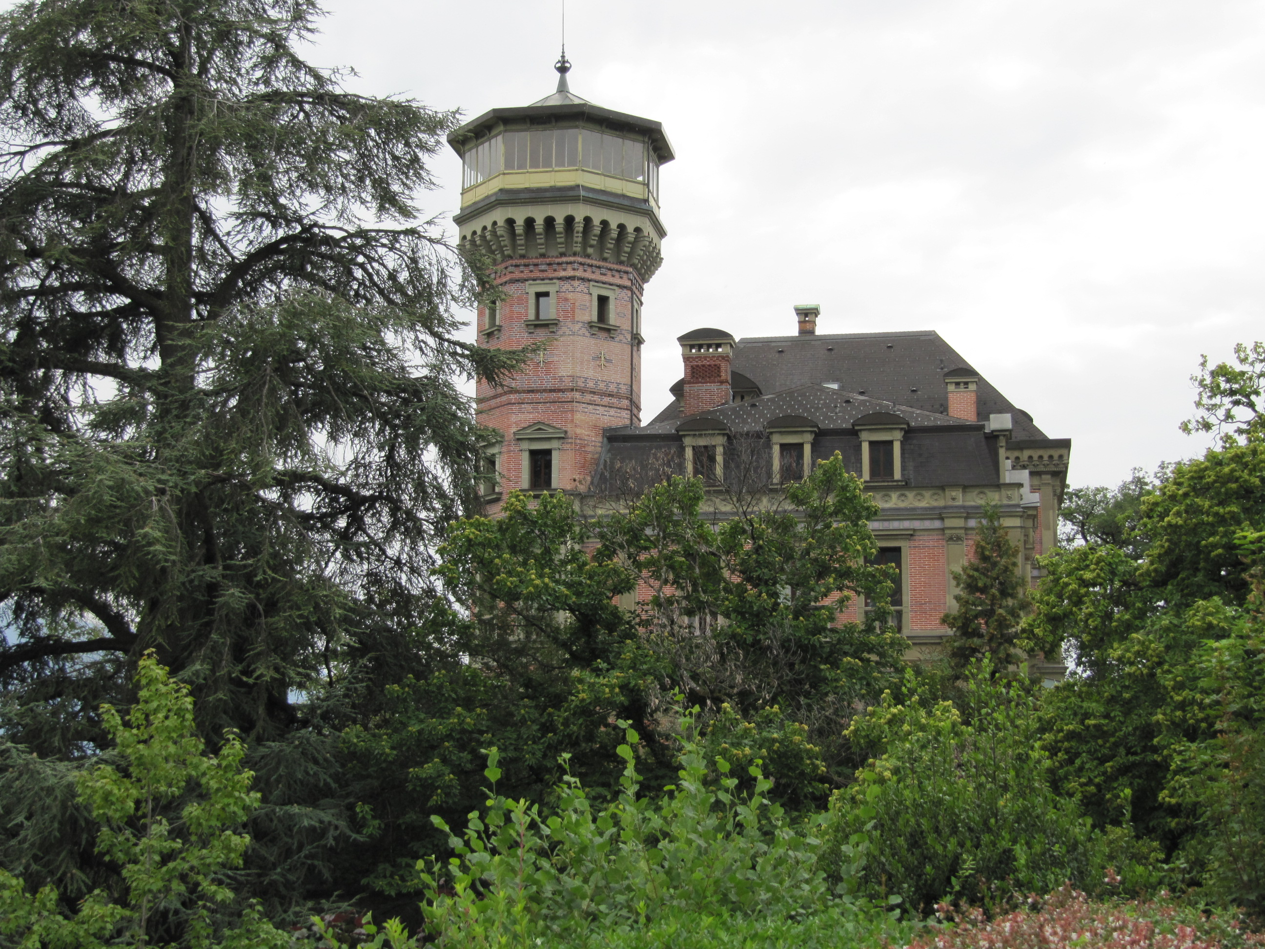 Château des Crêtes, Montreux, Suisse